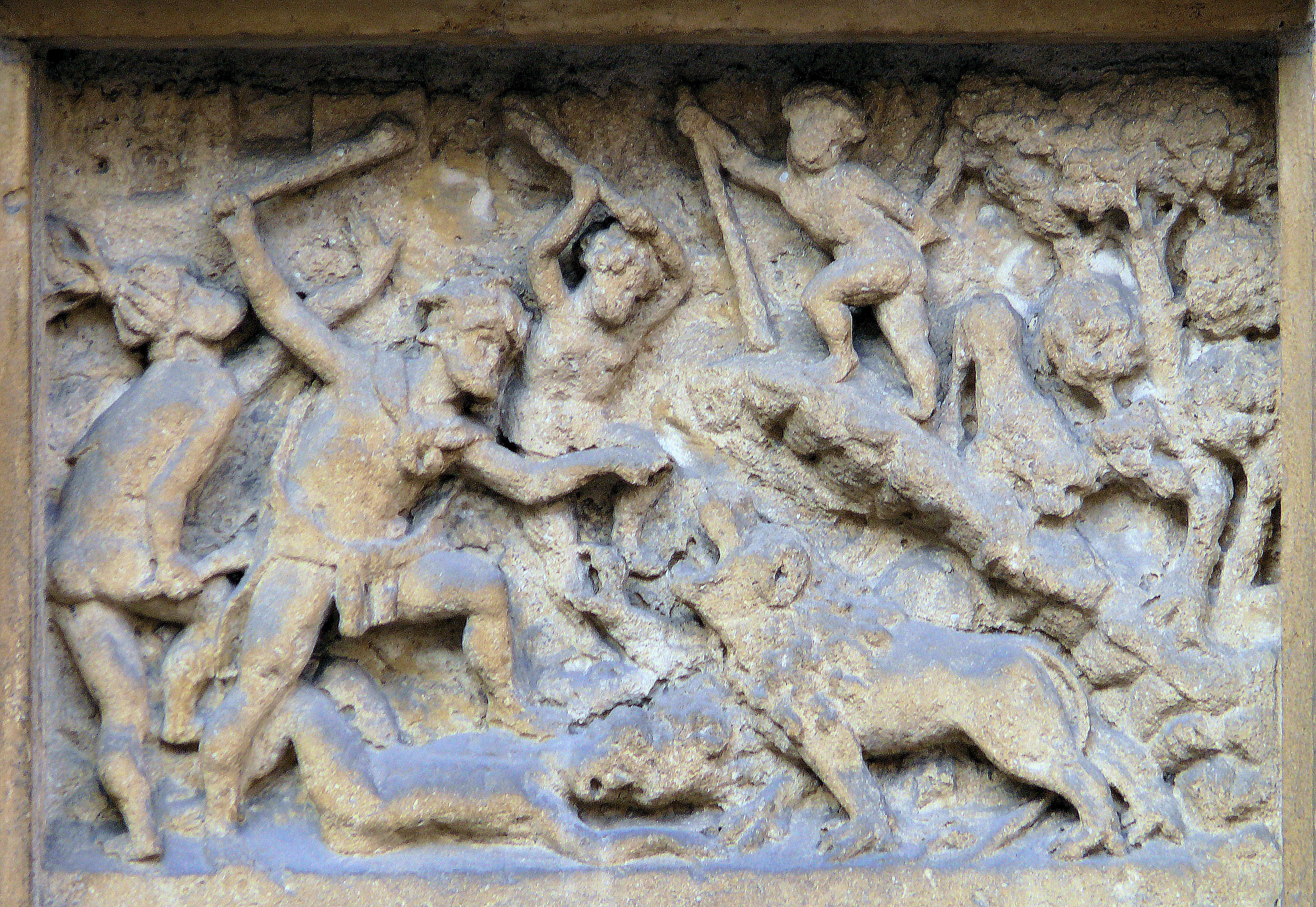 Metz - Maison des Têtes - Tympan de la porte d'entrée - Sauvages luttant avec un lion